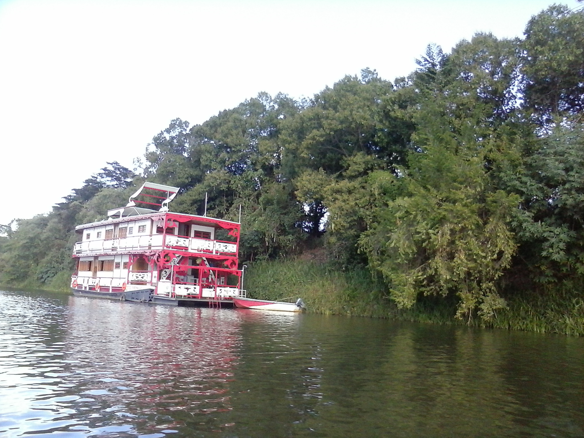 Belezas do nosso sertão.